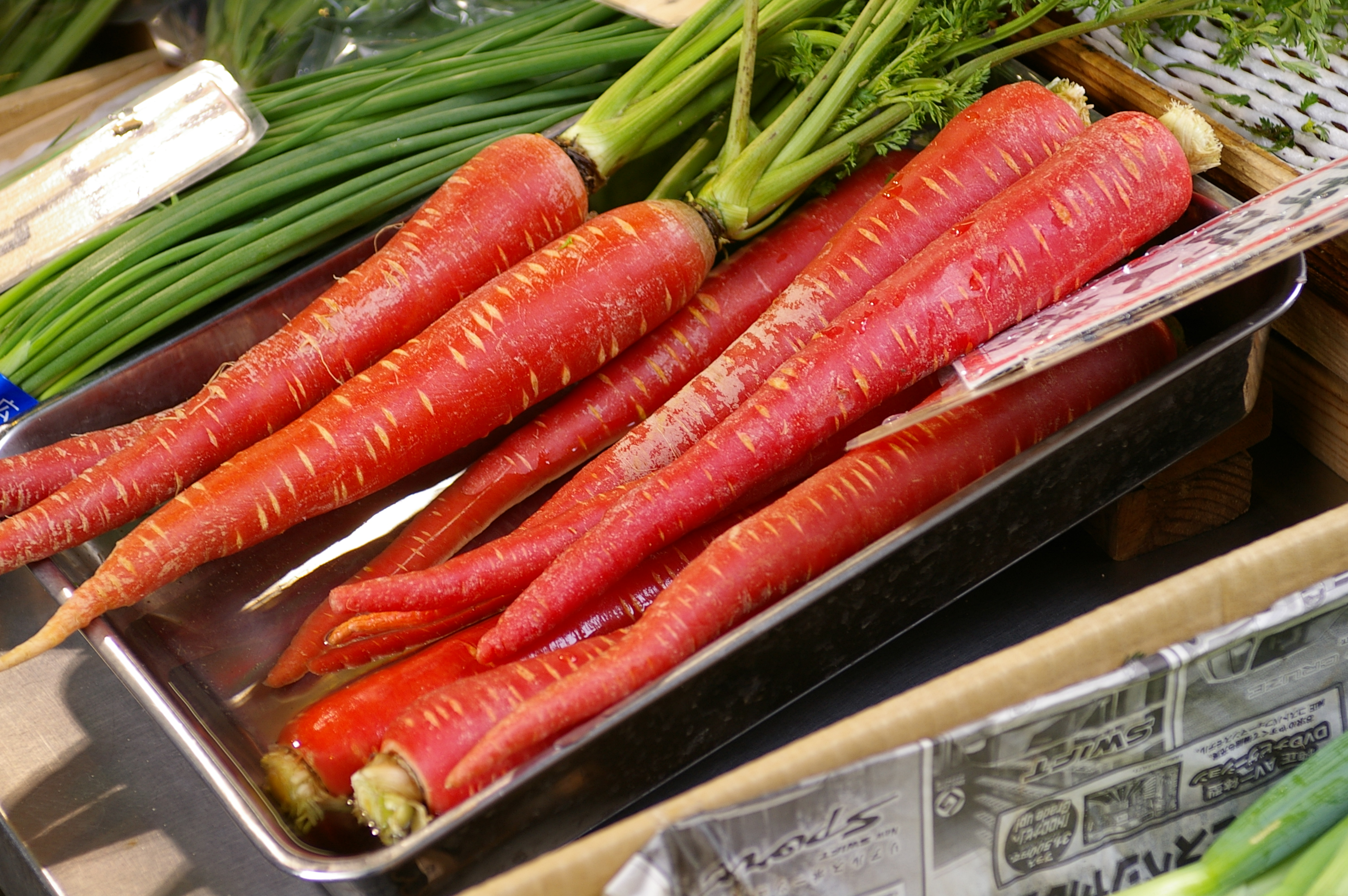 Kintoki Ninjin - Kyoto carrots